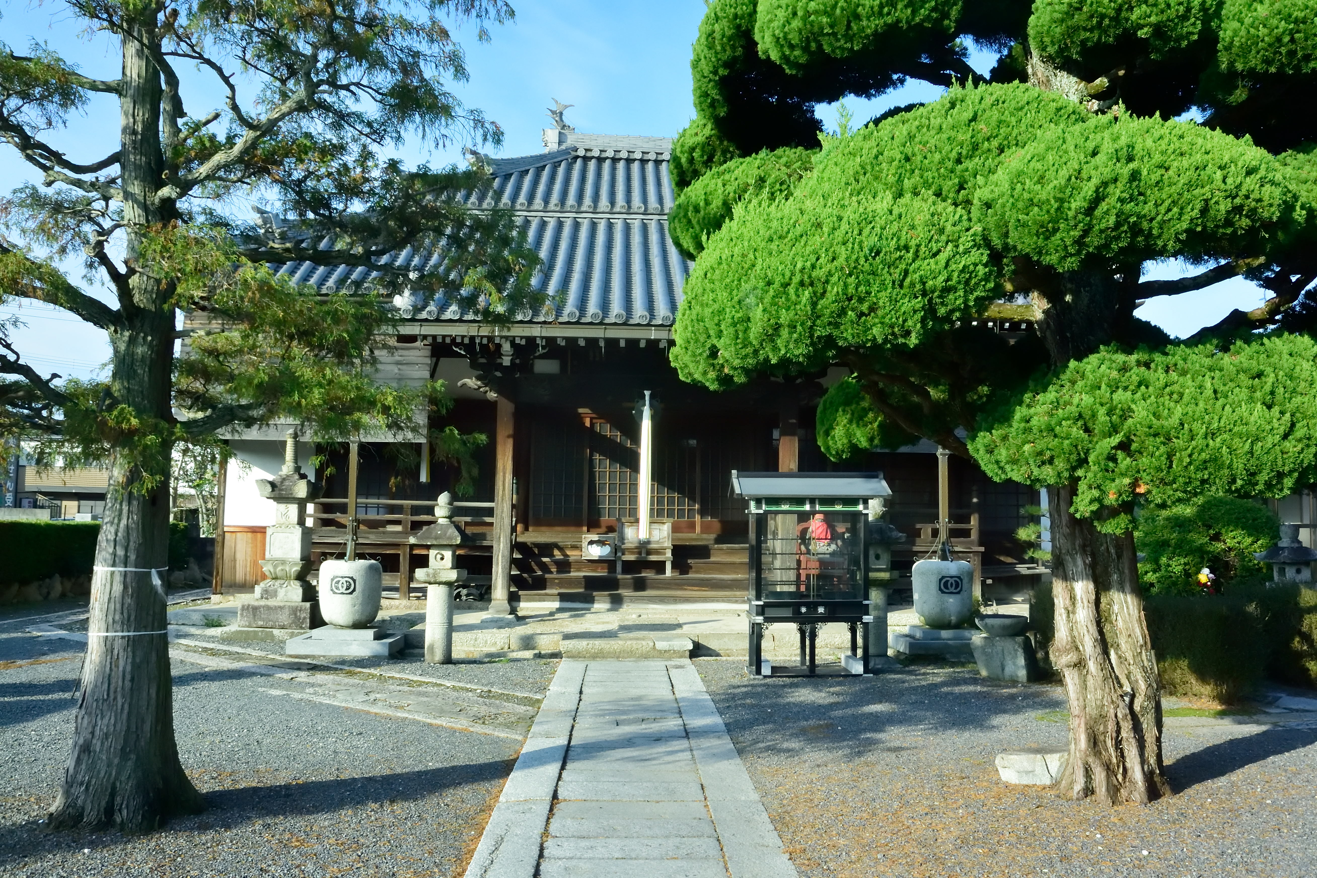 善福院本堂